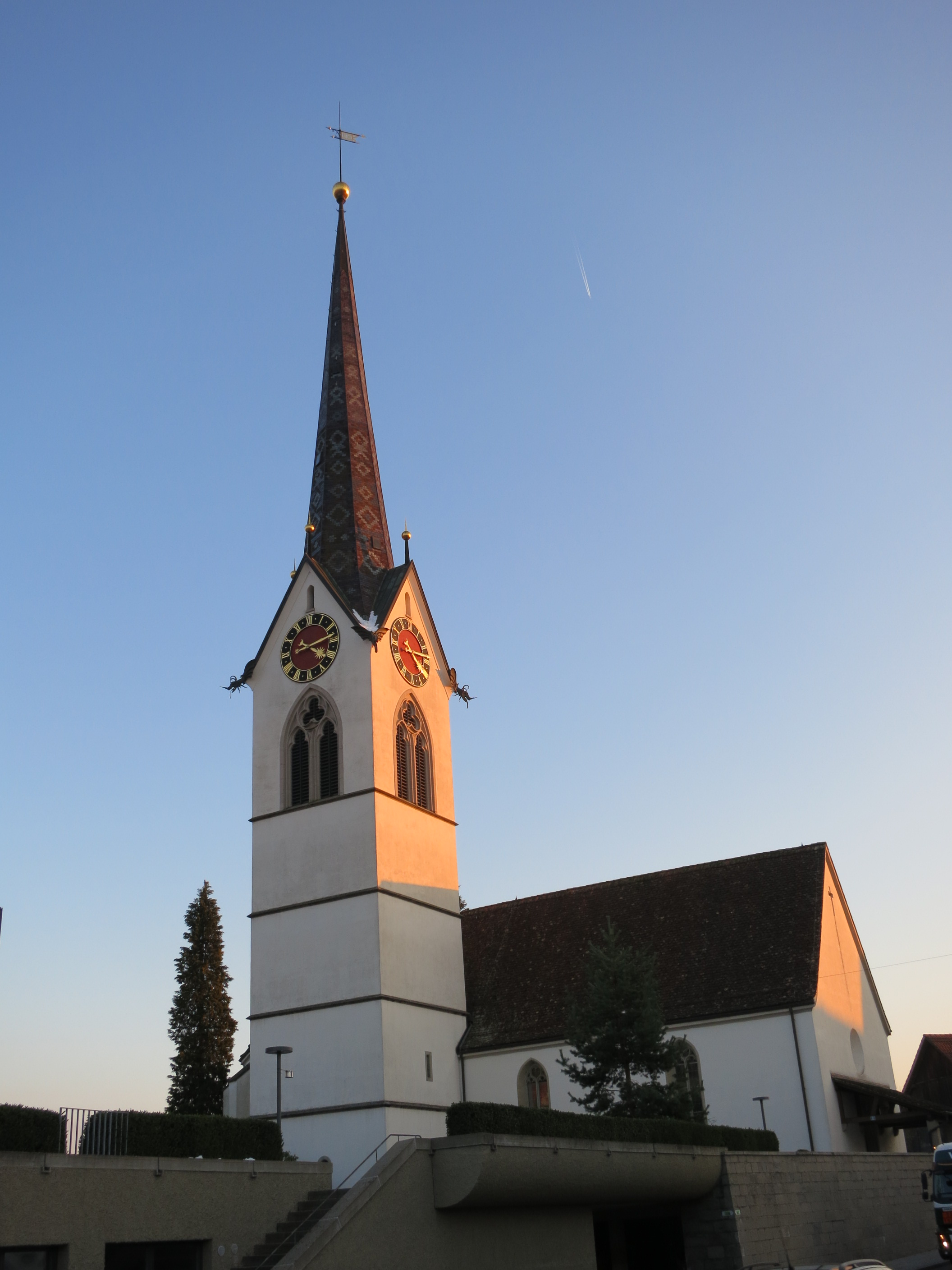 Reformierte Kirche, Mettmenstetten ZH, Schweiz